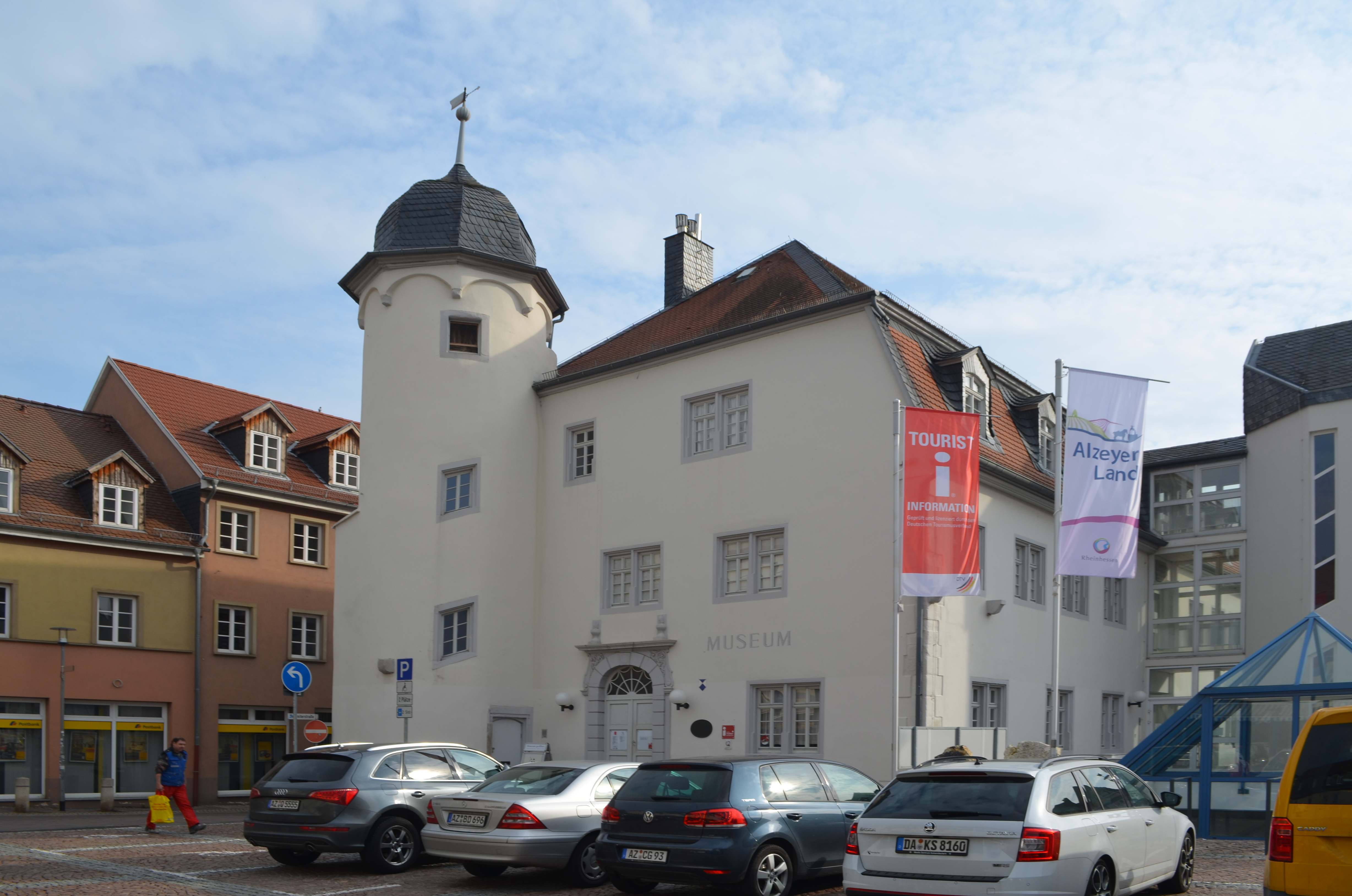 Alzey, Antoniterstraße 41